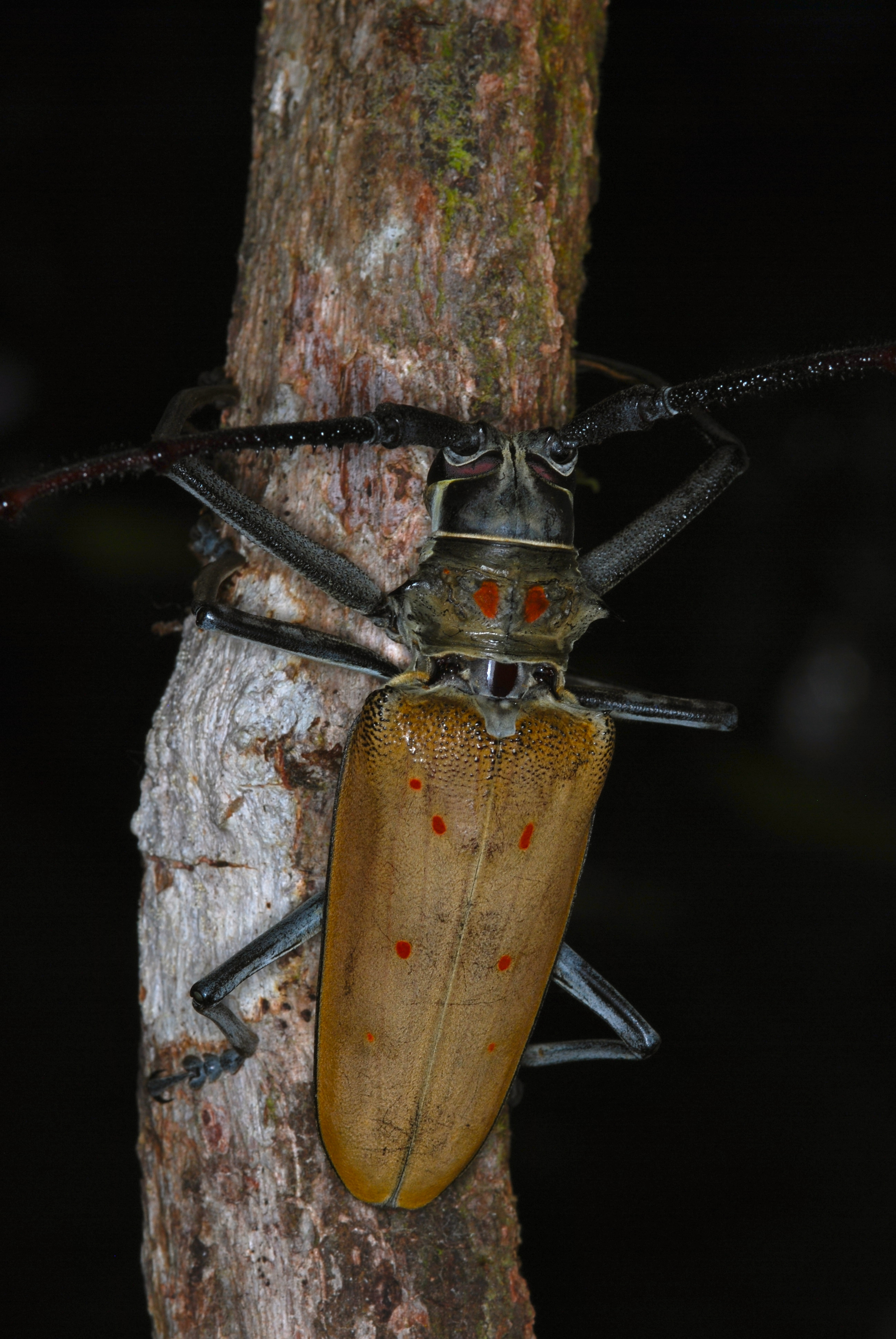 Tapah Hills, Perak, MALAYSIA